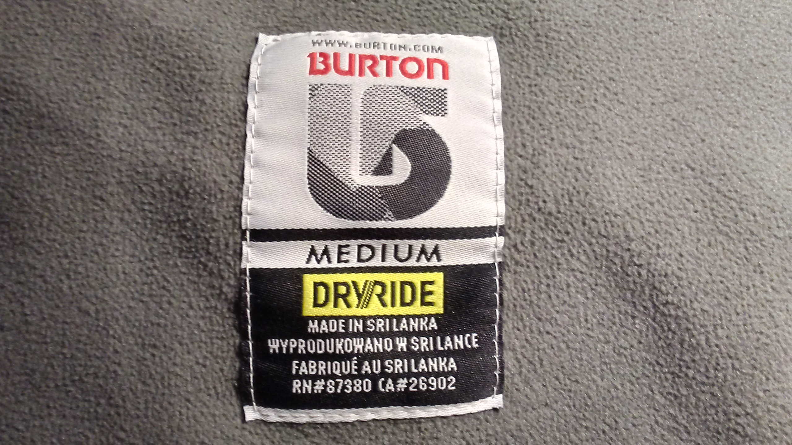 Logo Burton na odzieży legalnie dystrybuowanej w Polsce. CC0